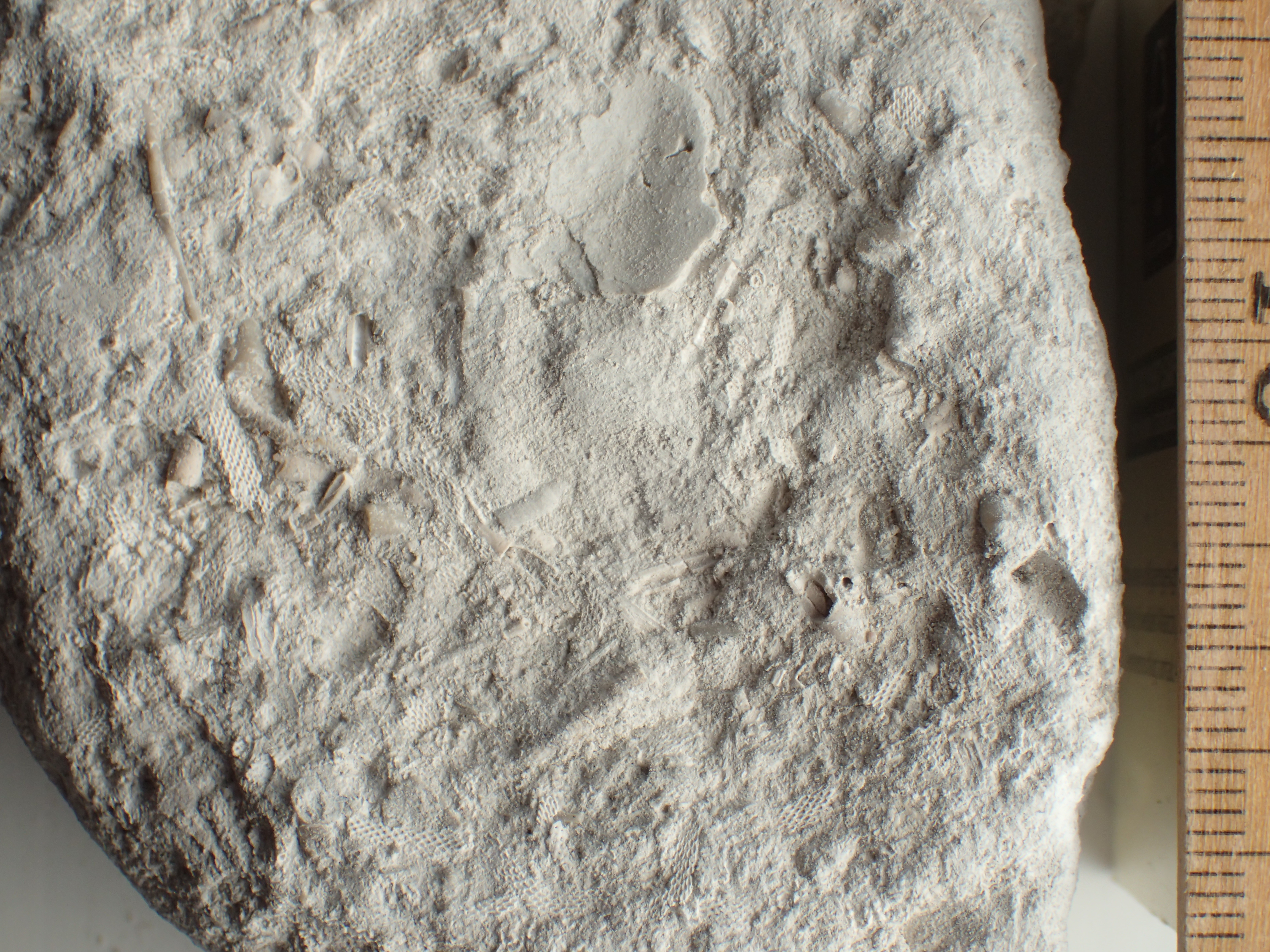 Kalksandskalk fra København kalk Fm med omlejrede bryozoer (netmønster) og skalstumper